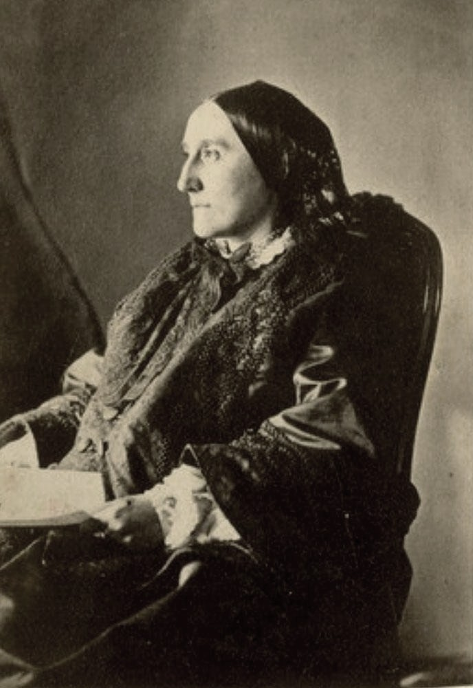 Княгиня Анна Андреевна Трубецкая, урож. Гудович (05.11.1818— 25.06.1882)